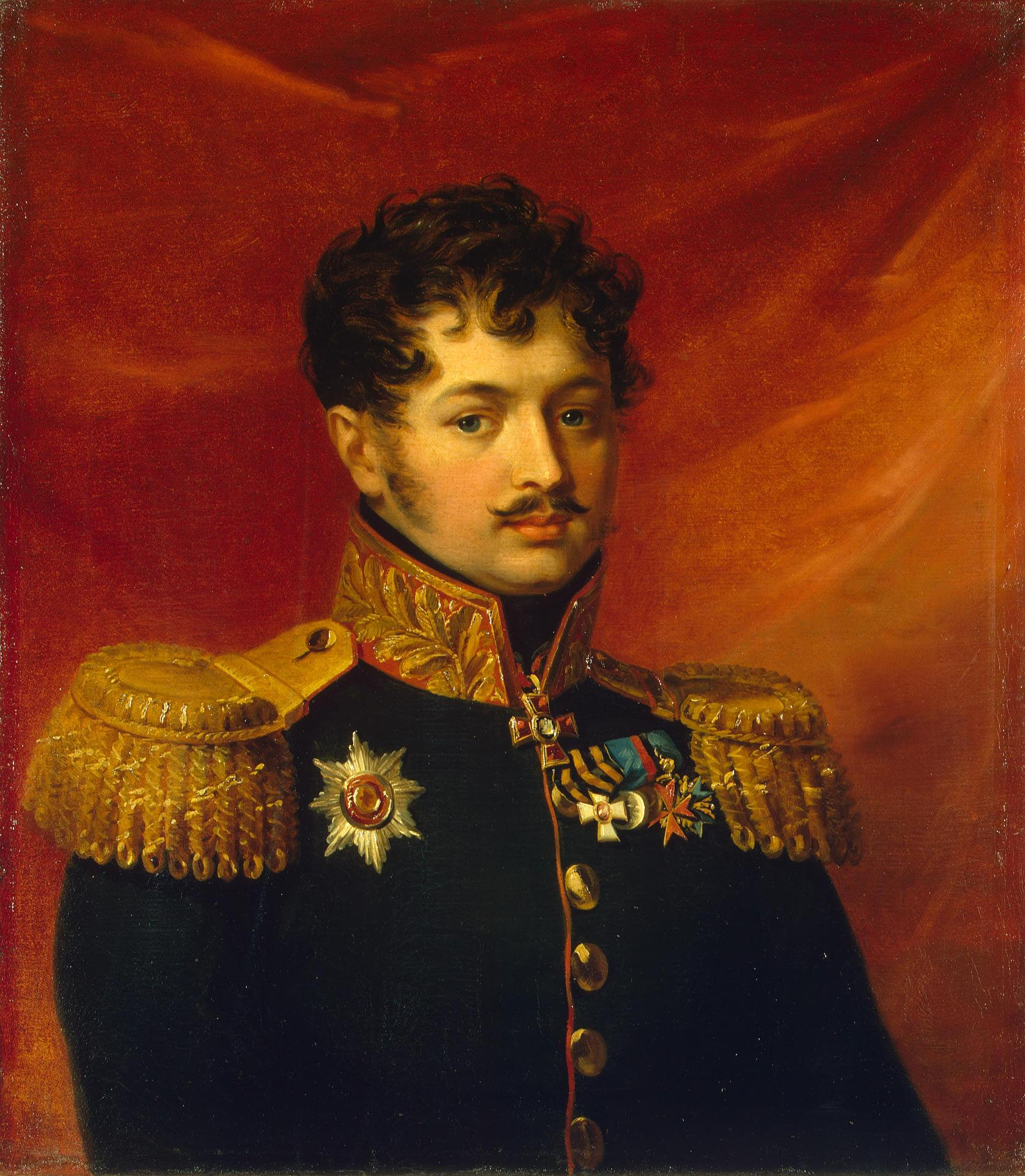 Pyotr Petrovich Zagryazhsky (1778 – 29.01.1849) russian general